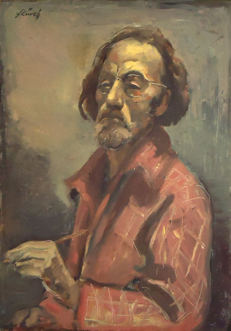 Selbstportrait